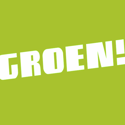 Logo der Partei Groen!